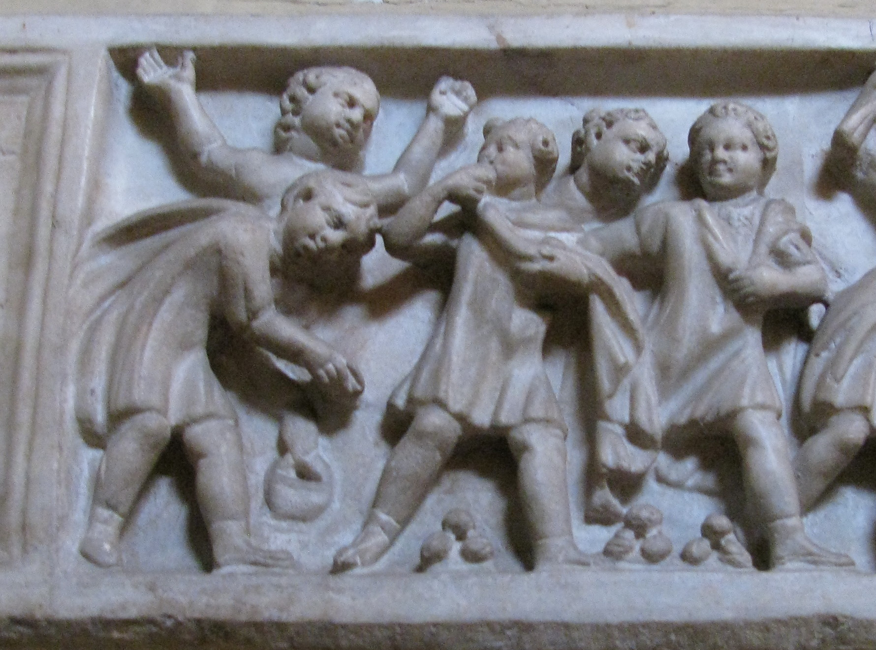 Enfants jouant aux jeux de noix. Détail d'un sarcophage d'enfant, vers 275-300 ap. J.-C.. Musée du Vatican, gallerie Pio Clementino